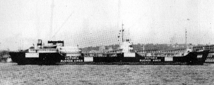 BM Victoria